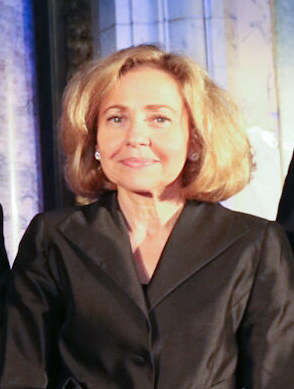 MADRID 12/11/2015. El presidente de Castilla-La Mancha, Emiliano García-Page, asiste a las 19:00 horas al acto de la XXI edición del Premio Pelayo a juristas de reconocido prestigio, que este año ha recaído en Fernando Ledesma Bartret, en el Casino de Madrid (foto Ignacio Lopez//JCCM)